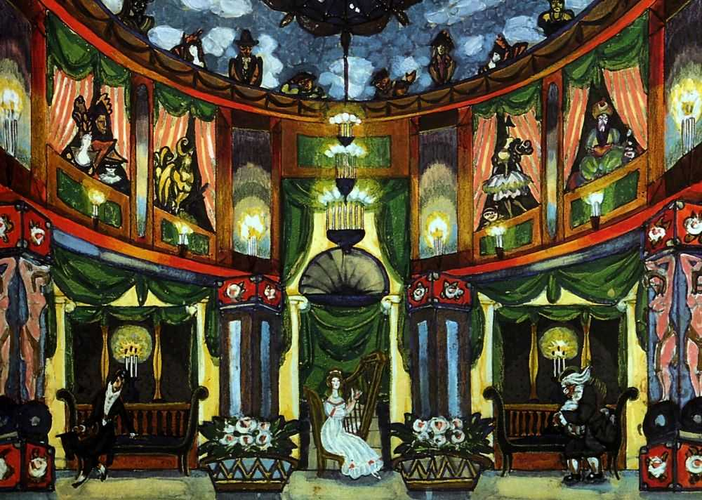 Судейкин Сергей Юрьевич. У Олимпии. Эскиз декорации к «Сказкам Гофмана» Ж.Оффенбаха. 1915